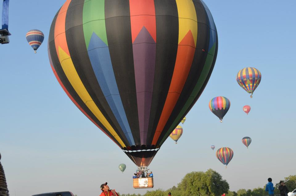 viaja en globo